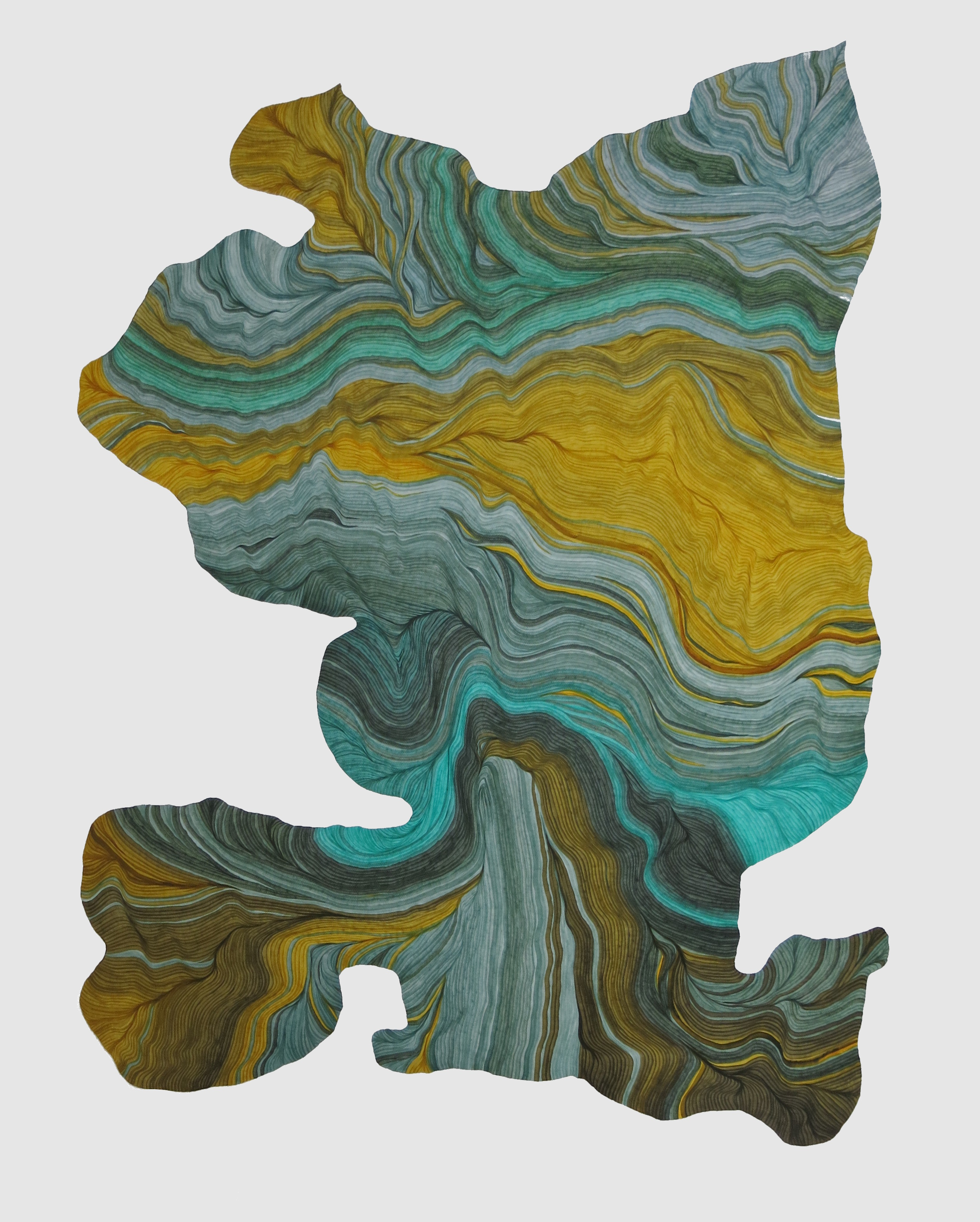 Tusche auf Papier 50x400cm